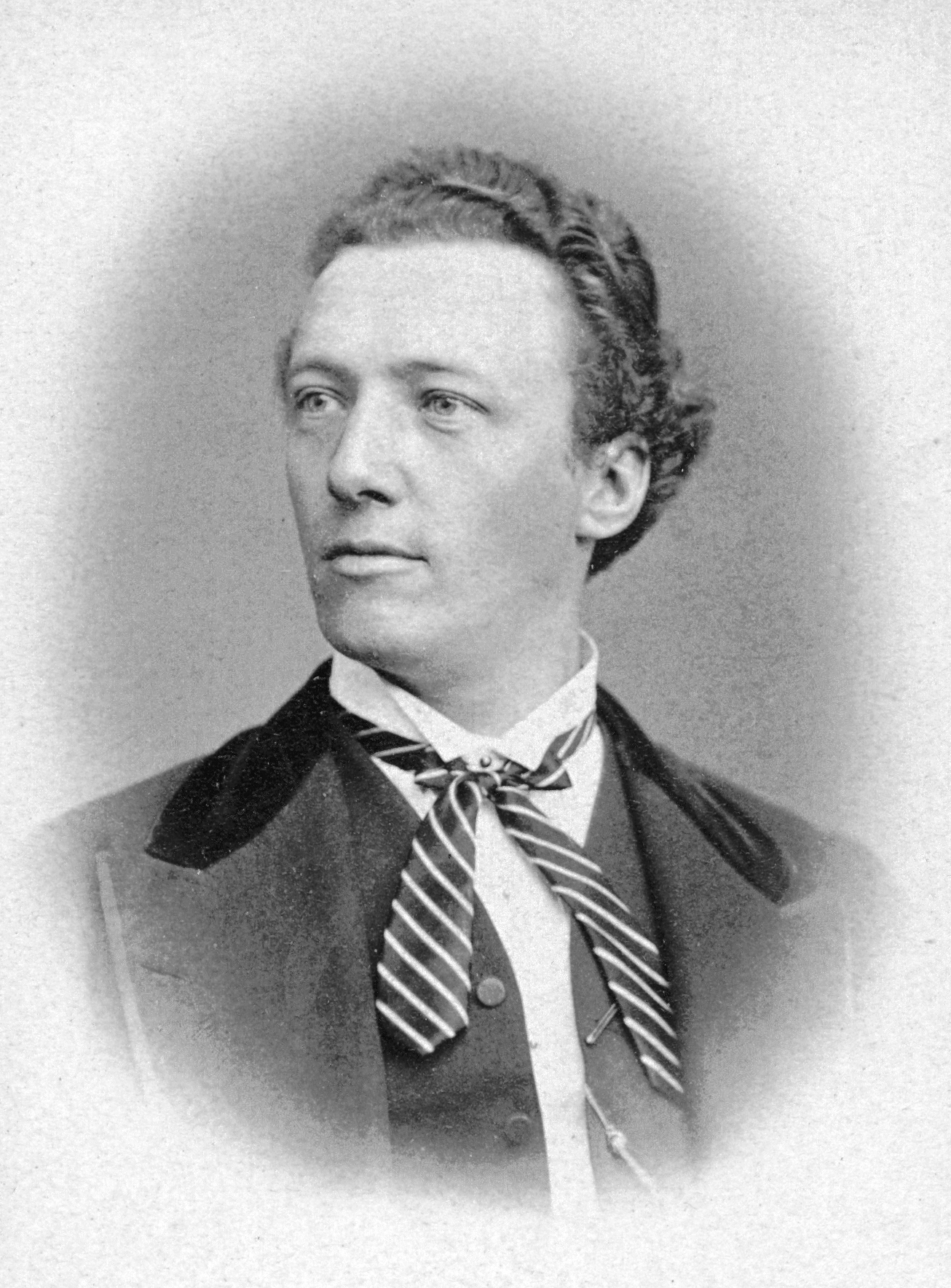 August Warberg, skådespelare vid Södra teatern 1865